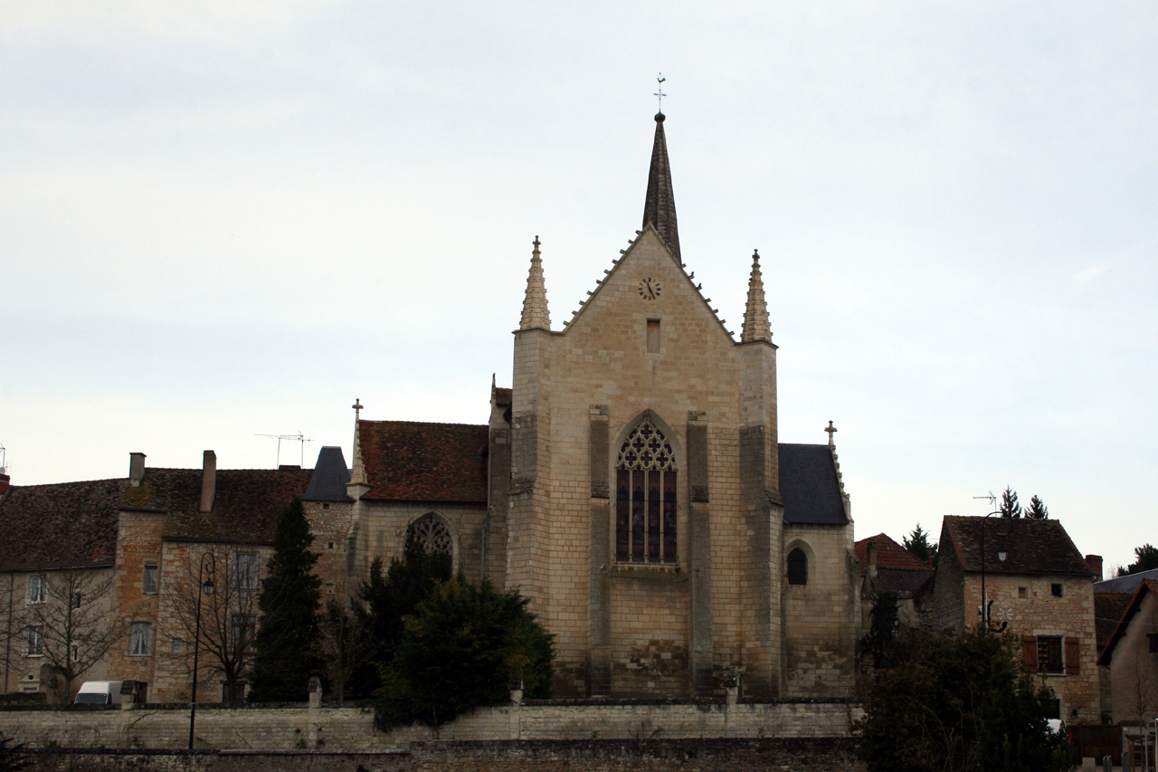 Eglise de Saint-Sauveur (Vienne)